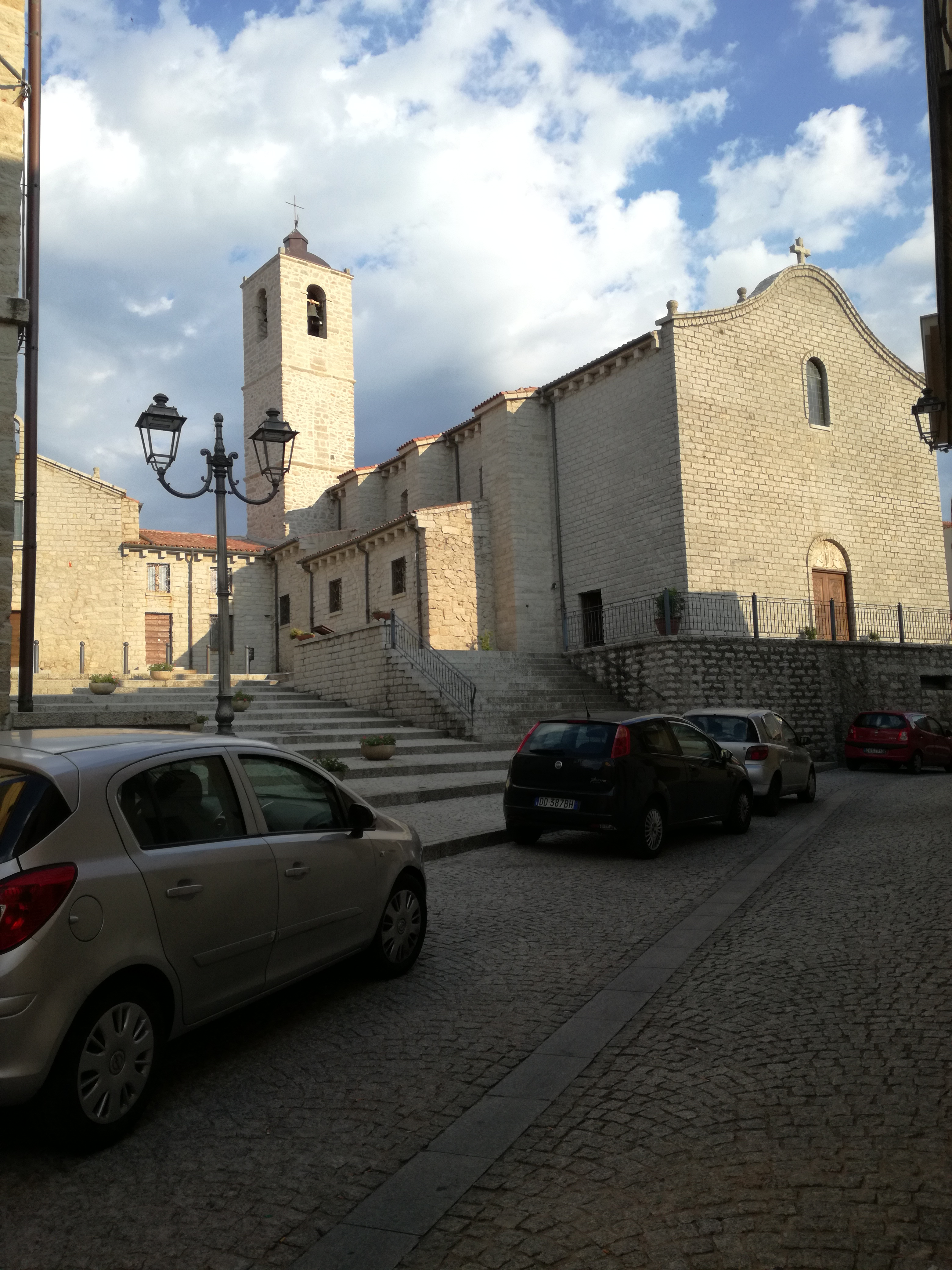 La monumentale chiesa parrocchiale di Calangianus.